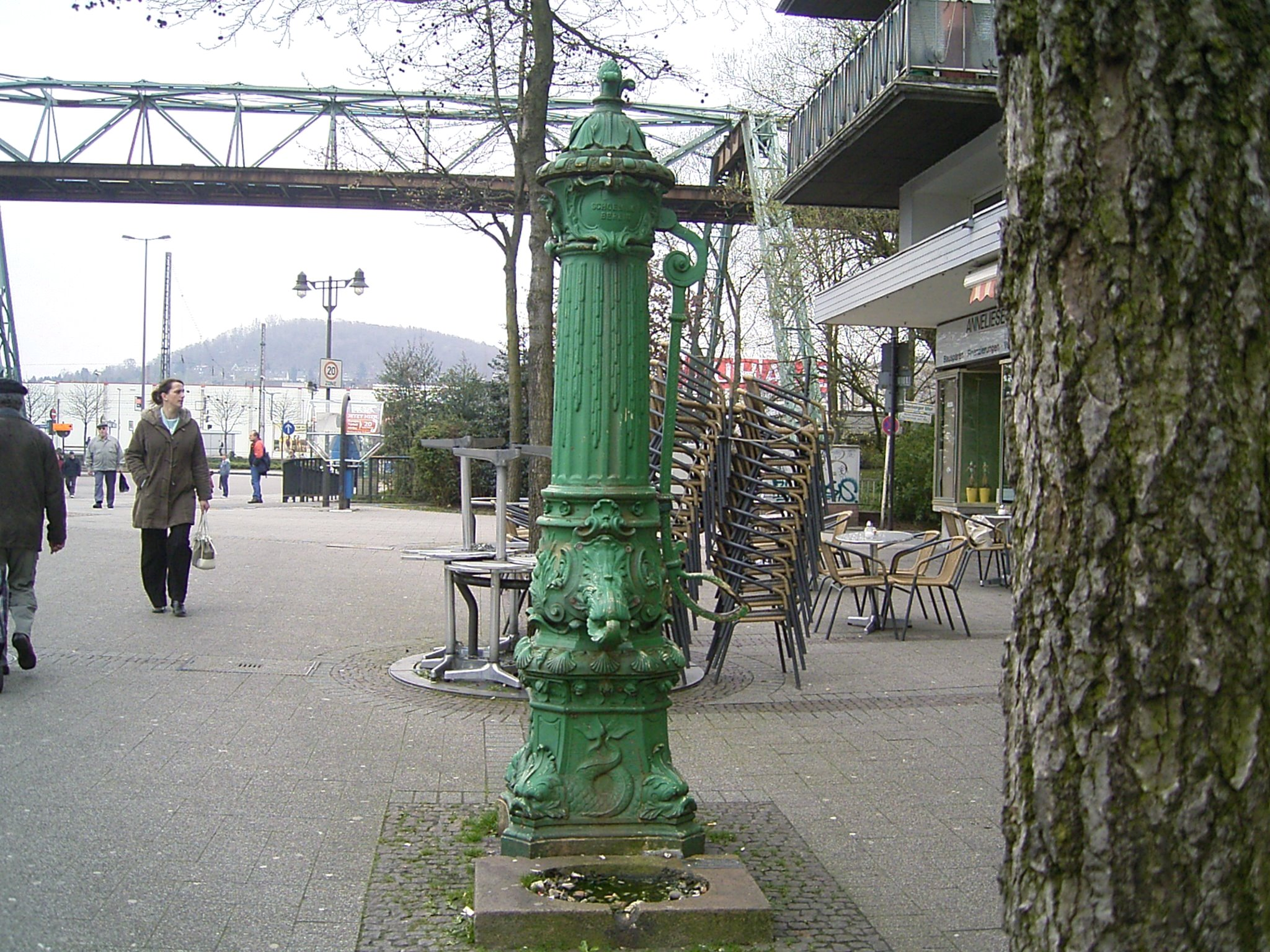 Berliner Pumpe in Wuppertal